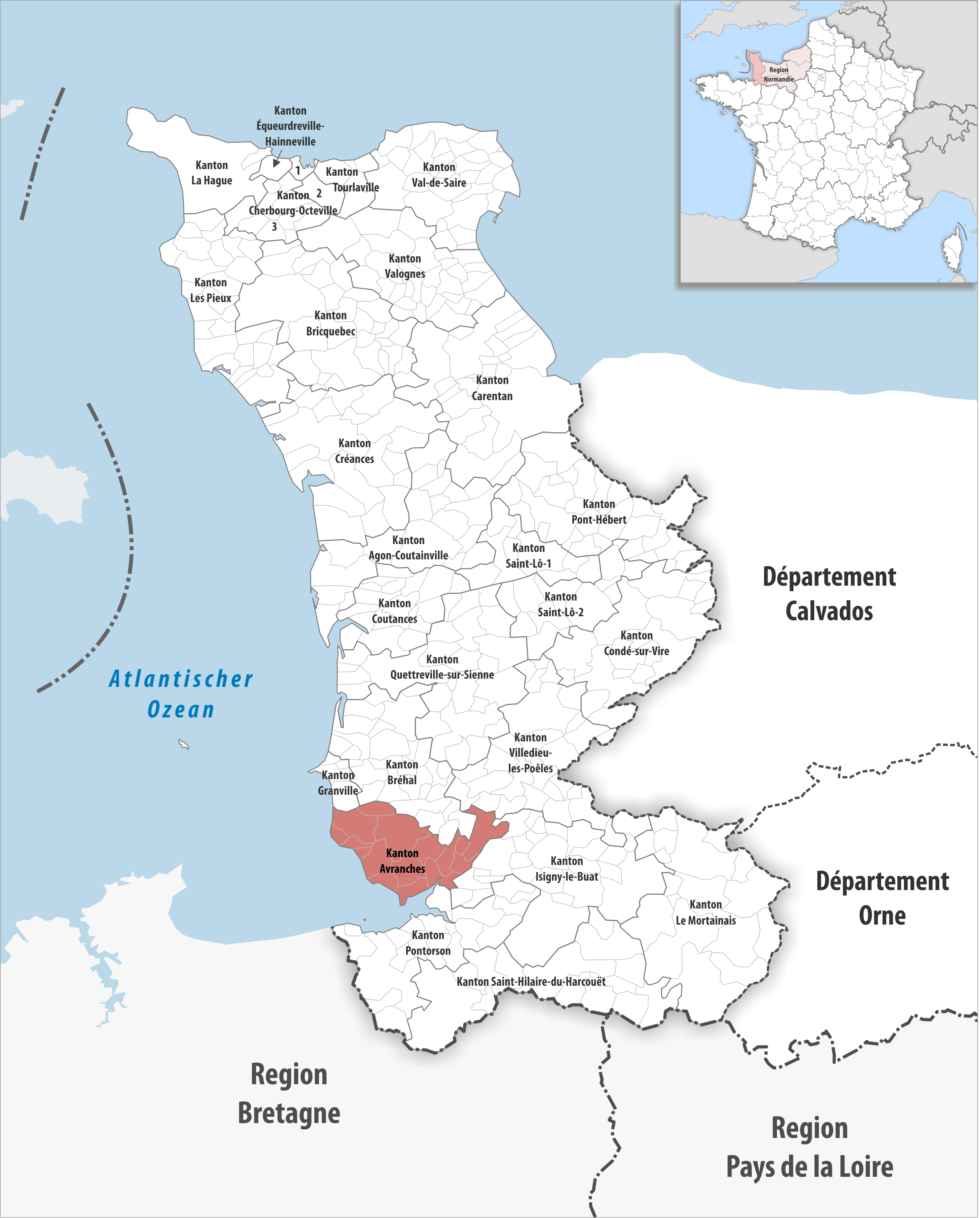 Lage des Kantons Avranches